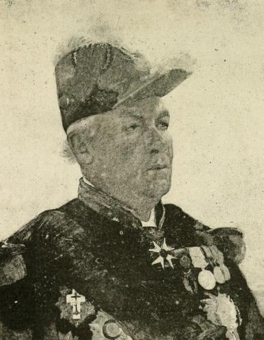 L'amiral Krantz